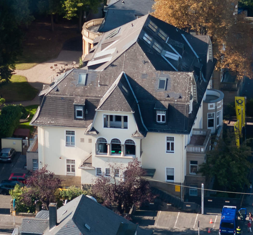 Ehemalige Landesvertretung Saarland in Bonn, Kurt-Schumacher-Str. 12–14: Blick vom Post Tower